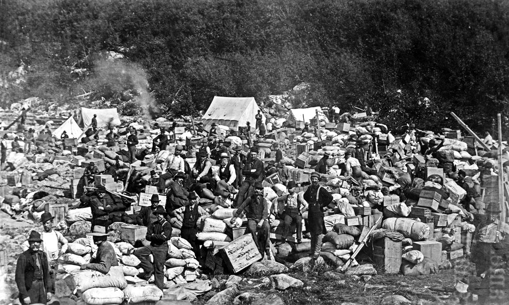 Старателі разом зі своєю поклажею на березі Даї.